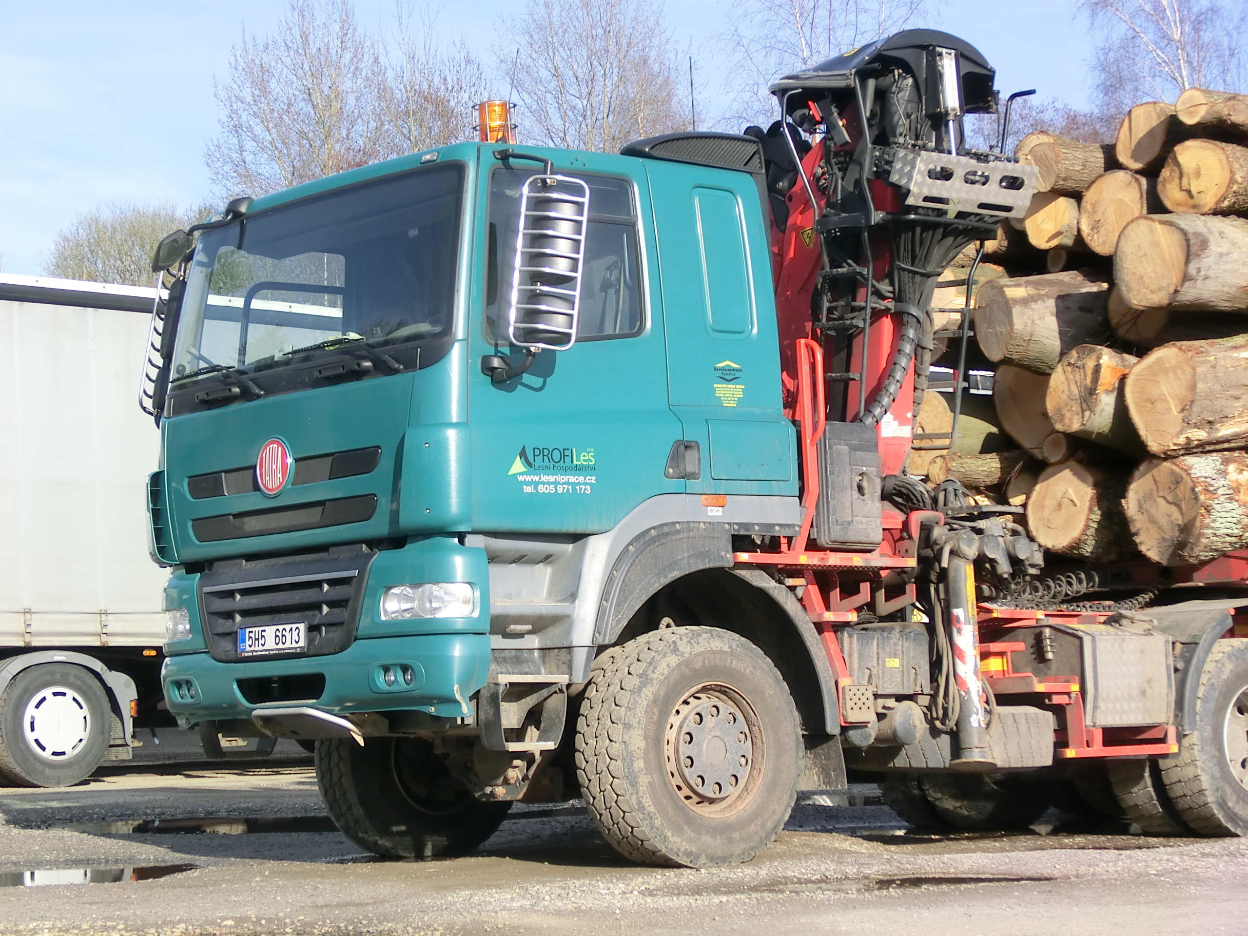 Tahač Tatra 158 Phoenix s lesáckou nástavbou odpočívá na dvoře BusLine Jilemnice.